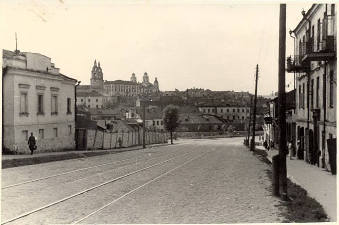 Беларуская (тарашкевіца): Менск (Miensk), вуліца Вялікая Барысаўская (vulica Vialikaja Barysaǔskaja). Направа Траецкае прадмесьце (Trajeckaje pradmieściе)